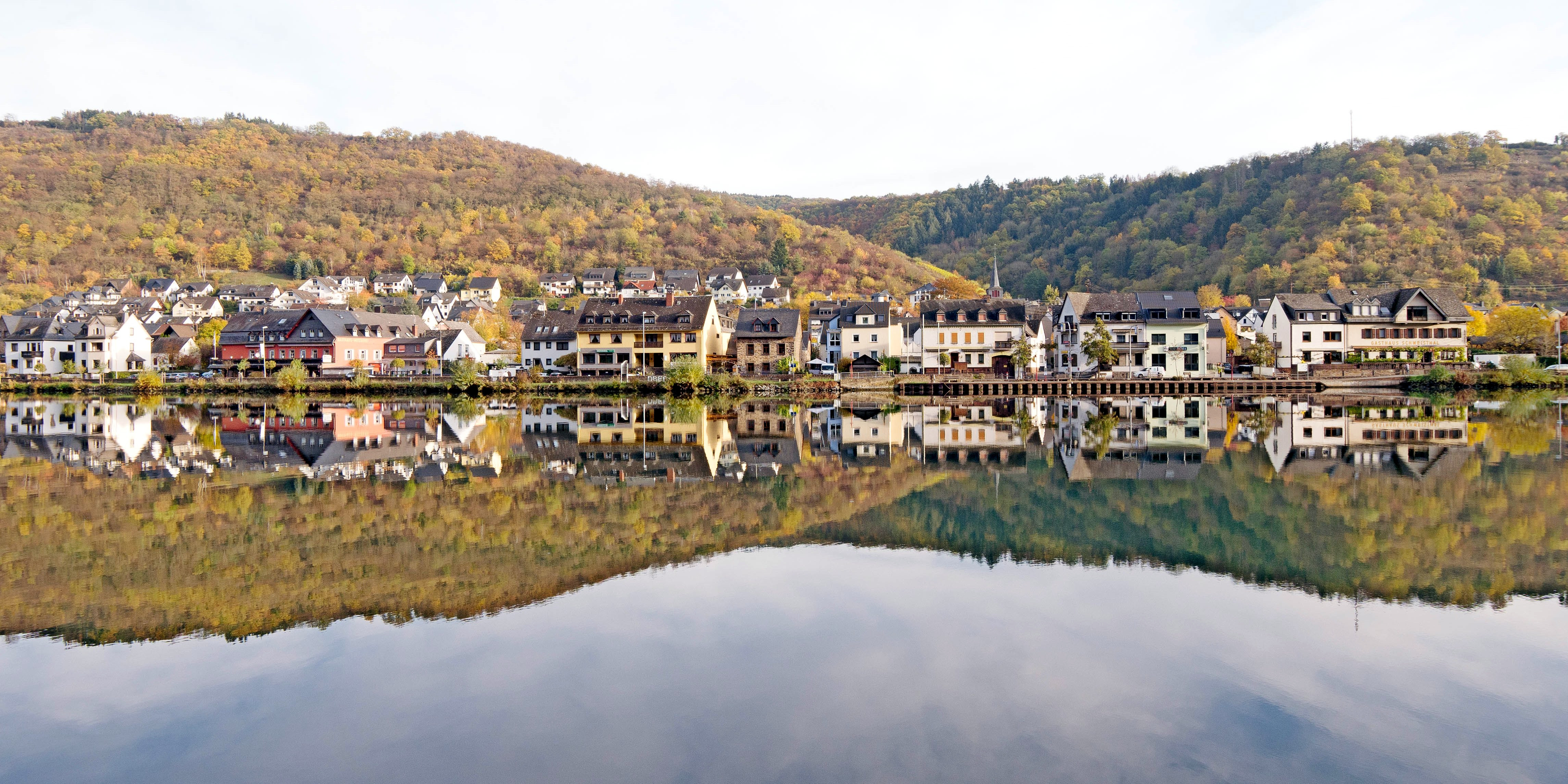 Oberfell vom gegenüberliegenden Moselufer